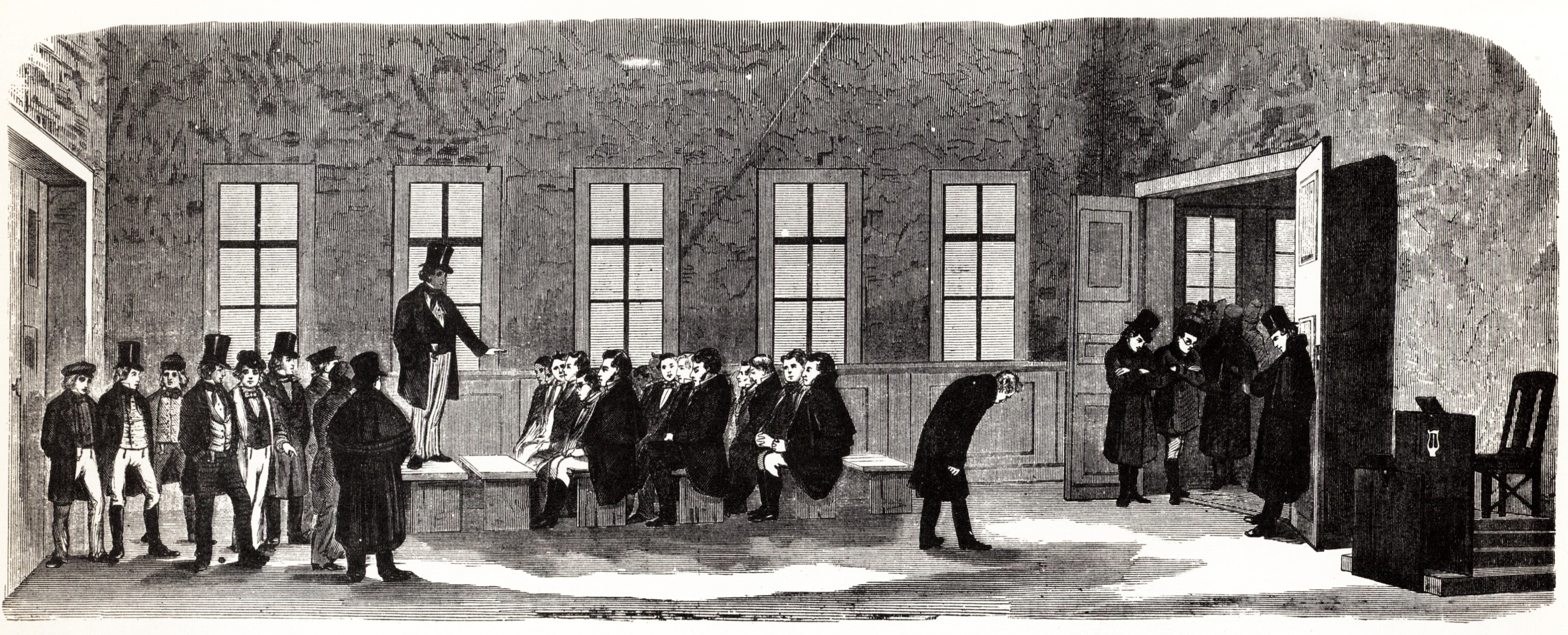 Pennalismen vid Gävle gymnasium. "En avstraffad delinkvent smyger sig under ödmjuka bugningar ut från ett consilium på Gävle gymnasium" Träsnitt efter teckning av Carl Gustaf Hellqvist i Ny illustrerad tidning